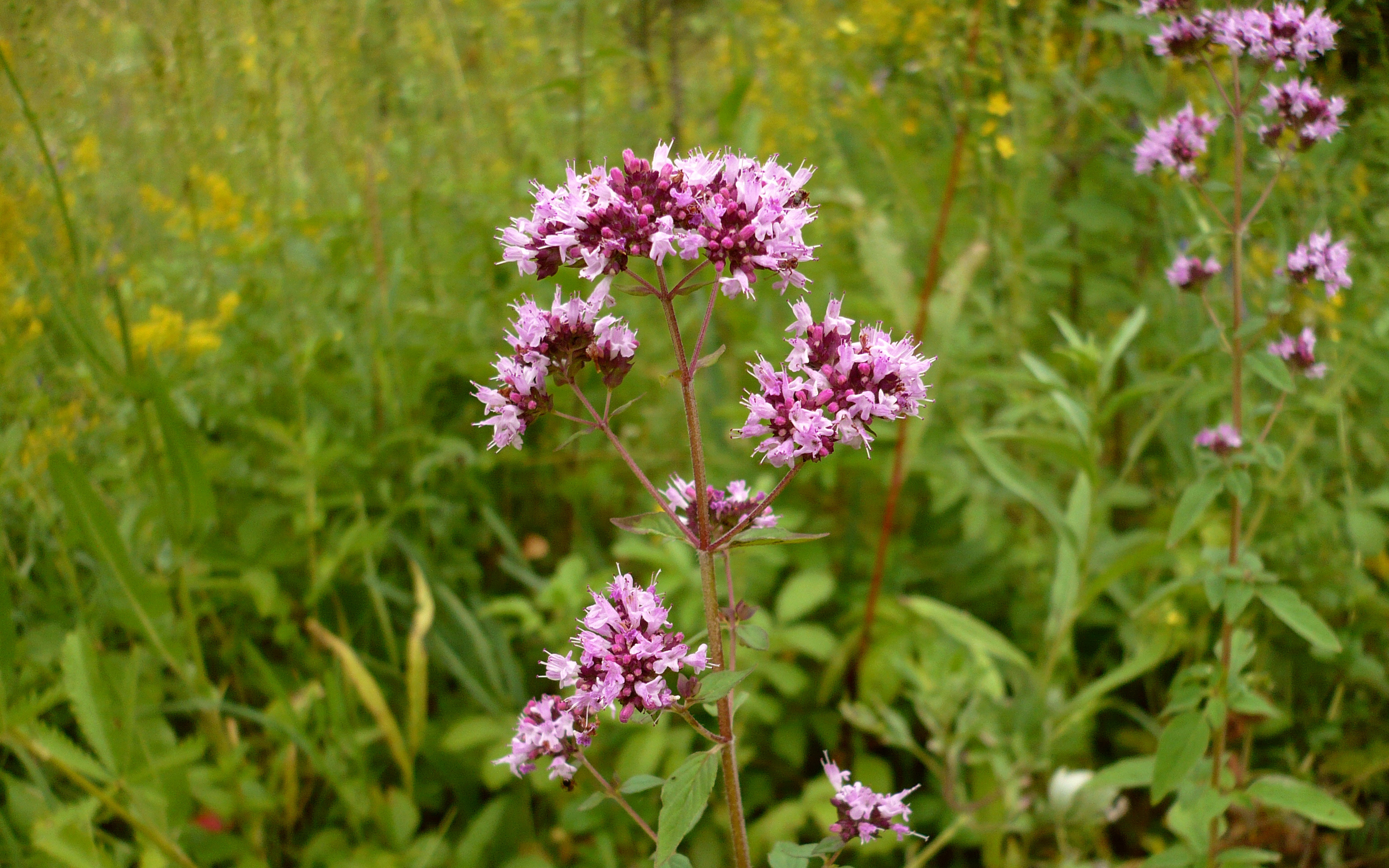 Душица обыкновенная. Балка Пёстрая, Шебекинский район Белгородской области.